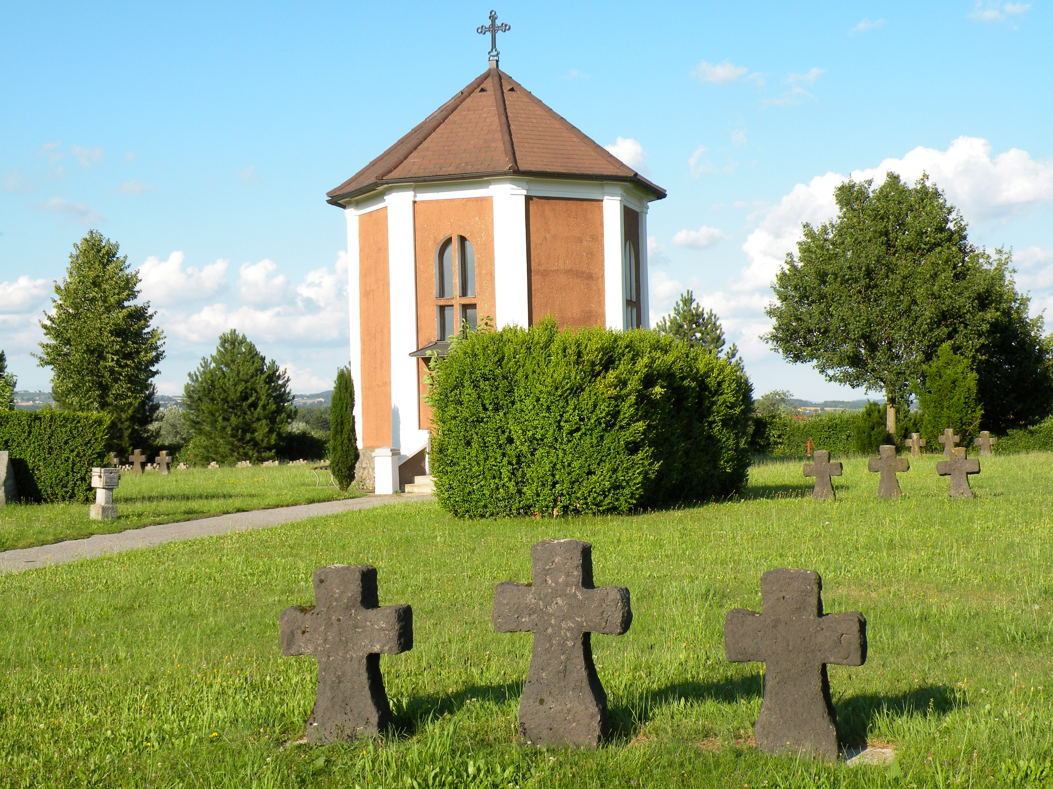 Soldatenfriedhof, Italienerfriedhof